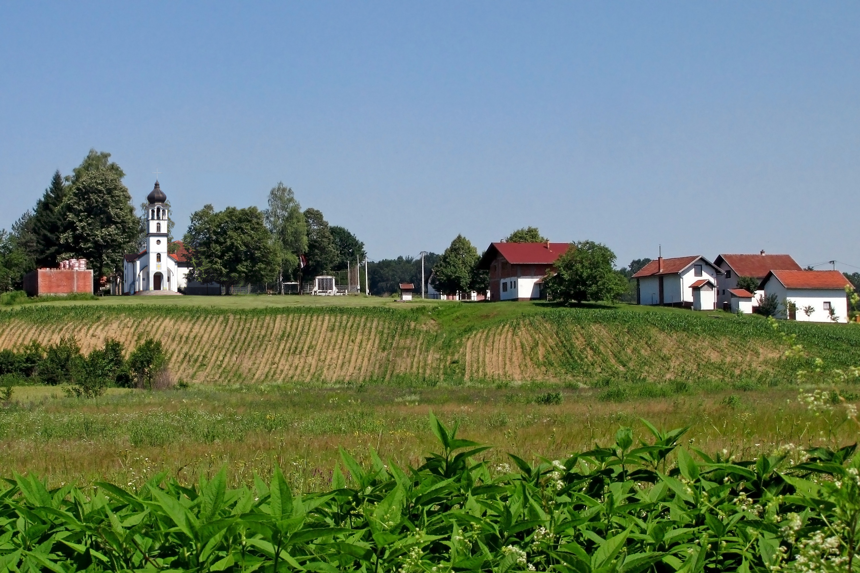 Јелањска (Добој)